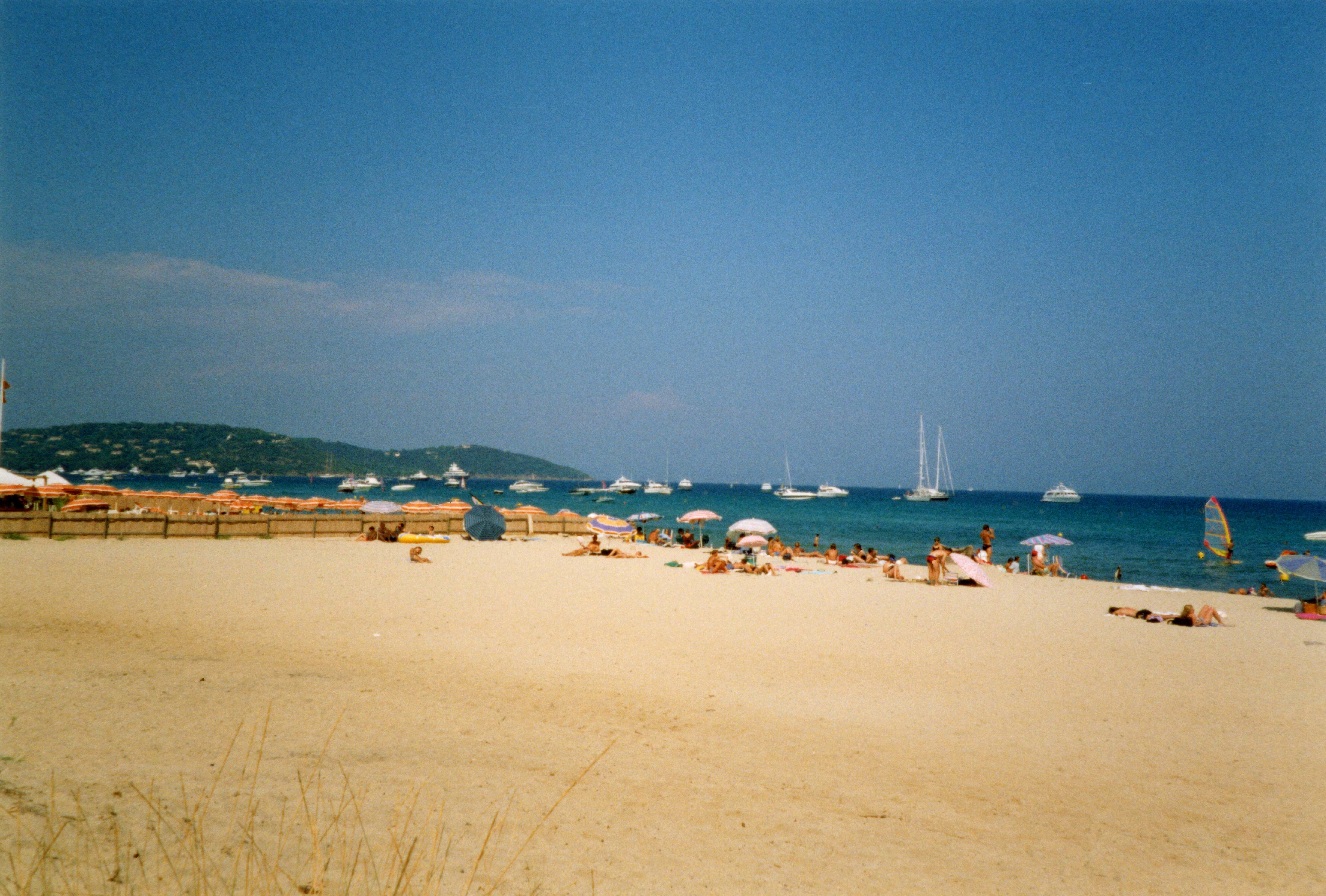 La grande Plage de Pampelonne divisée en plages publiques et privées. A l'arrière plan, on aperçoit le Cap du Pinet. La Plage de Pampelonne est située sur le territoire de la commune de Ramatuelle (presqu' île de Saint-Tropez). Plage de Pampelonne, Var, France.